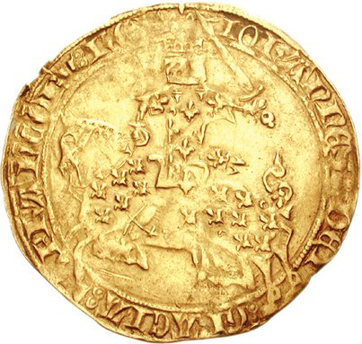 Турский ливр. Аверс